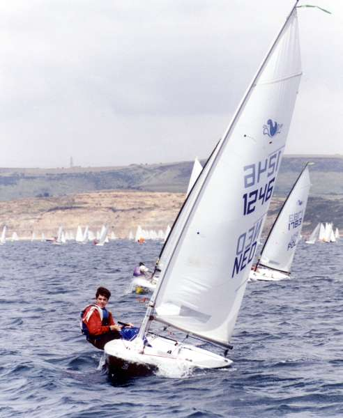 Foto van Splash tijdens WK in weymouth, juli 2003